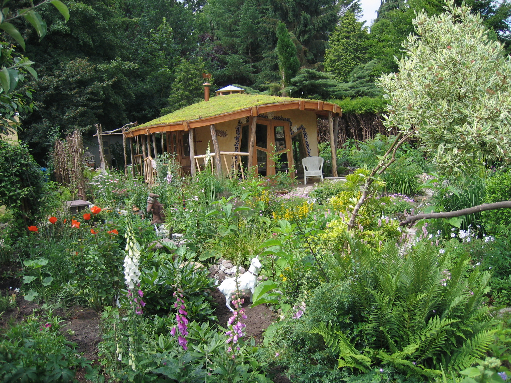 Kolonihave i Groningen/Nederlande.